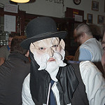 type de deguisement